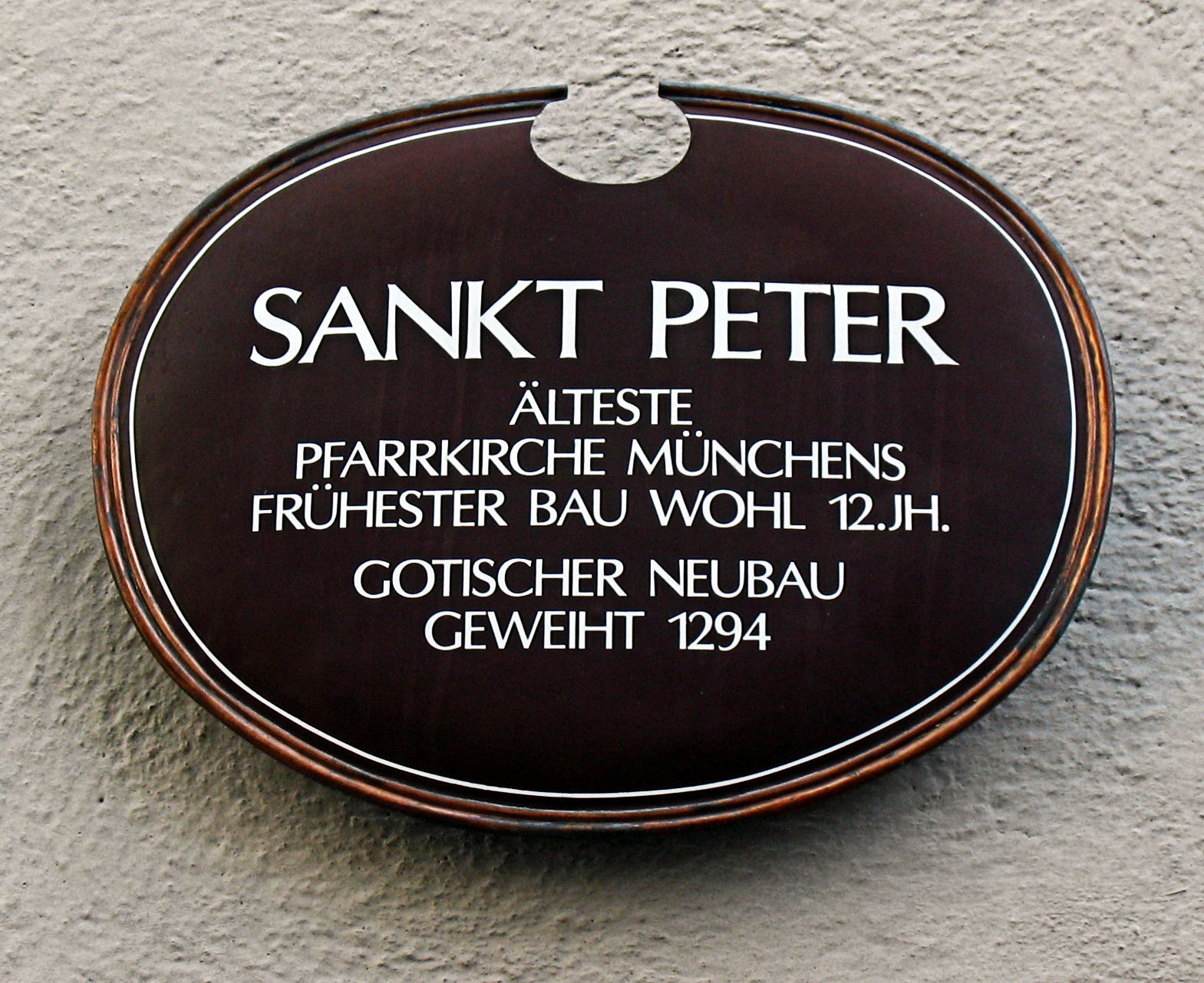 Gebäudetafel, St. Peter, München, Bayern